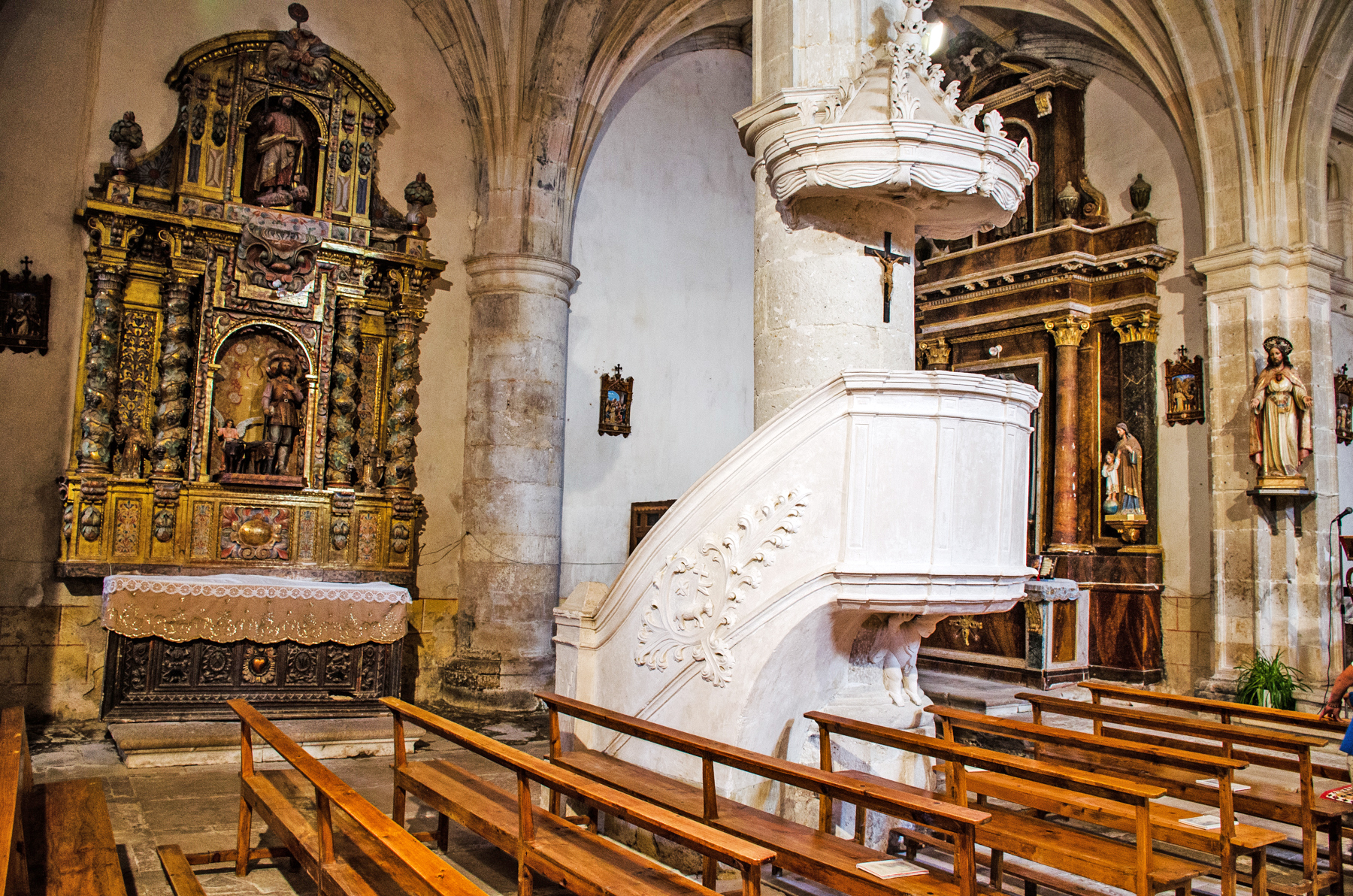 Púlpito de la iglesia de San Juan Bautista de Amaya (España).